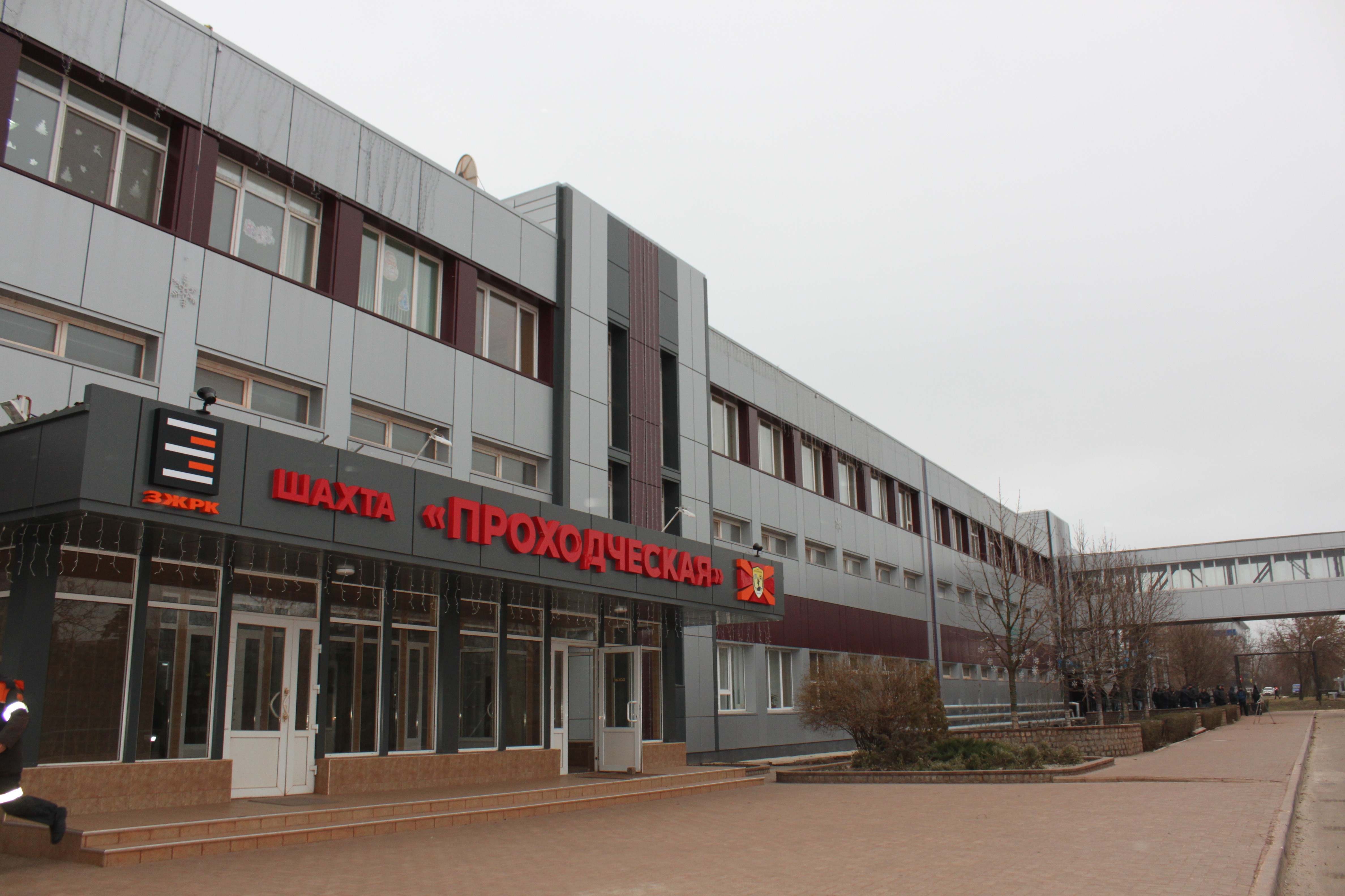 Шахта "Проходческая"